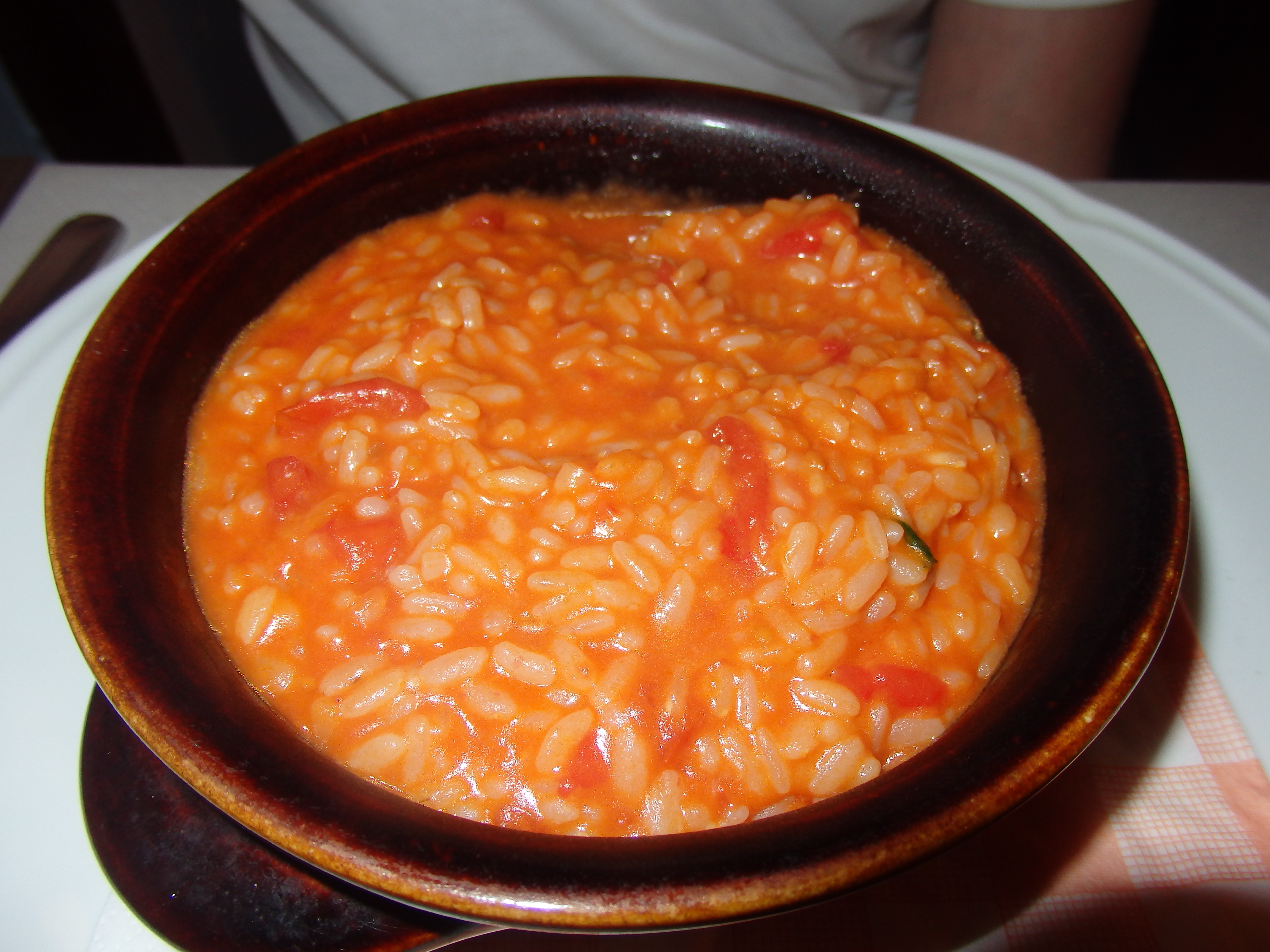 Riso con pomodoro e provola di Sorrento. Osteria la Chitarra, Napoli.